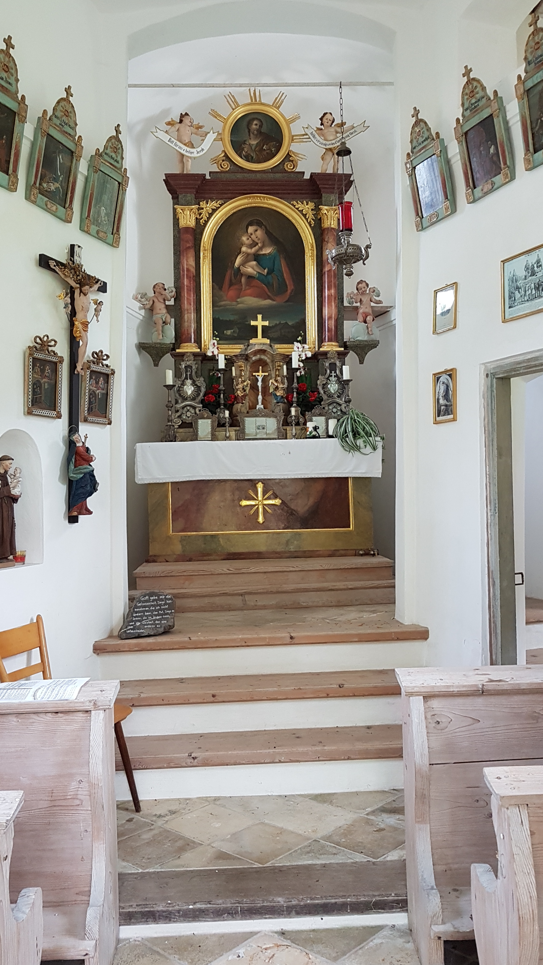 Weihermühle (Egling), Kapelle Mariä Heimsuchung, Innenraum.